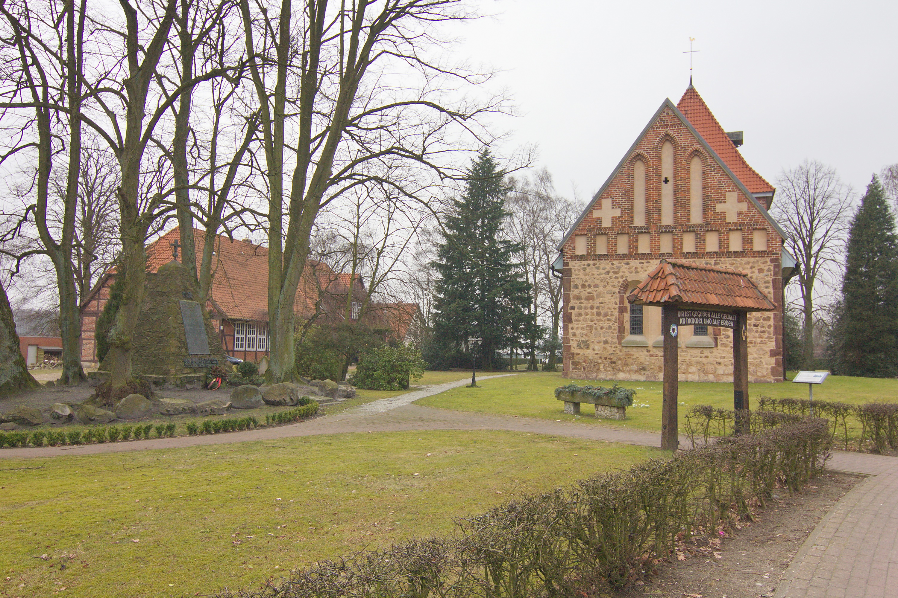 St.Nicolaikirche (erste Erwähnung des Turms 1699) in Borstel im Landkreis Diepholz, Niedersachsen, Deutschland.